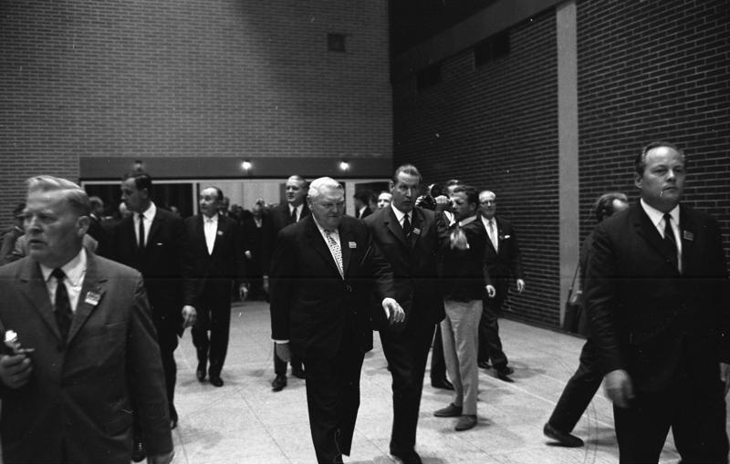 Tagung des Evangelischen Arbeitskreises CDU/CSU mit Bundeskanzler Prof. Erhard (Mitte) in Bochum, Ruhrlandhalle